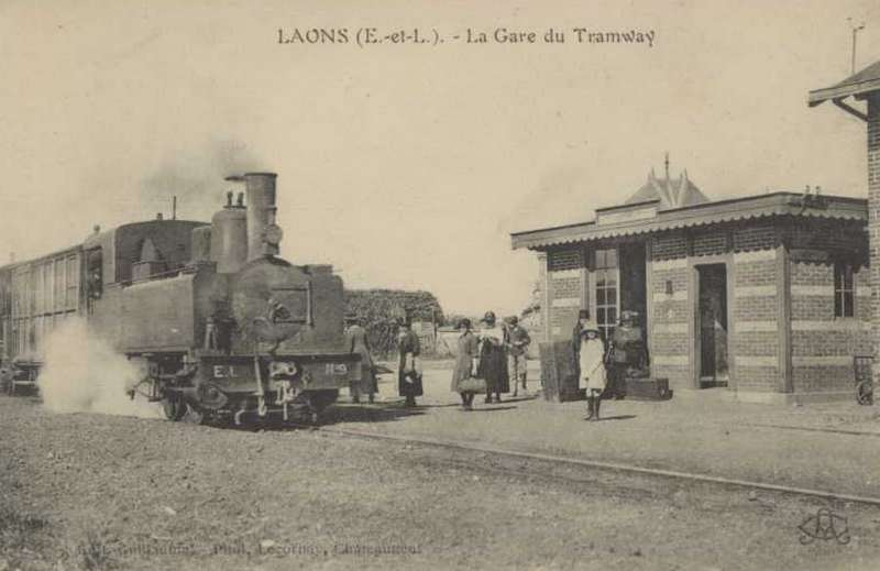 Le Tramway d'Eure-et-Loir à Laons. Locomotive n°9 nom "Laons" (Corpet Louvet n°851 de 1900).